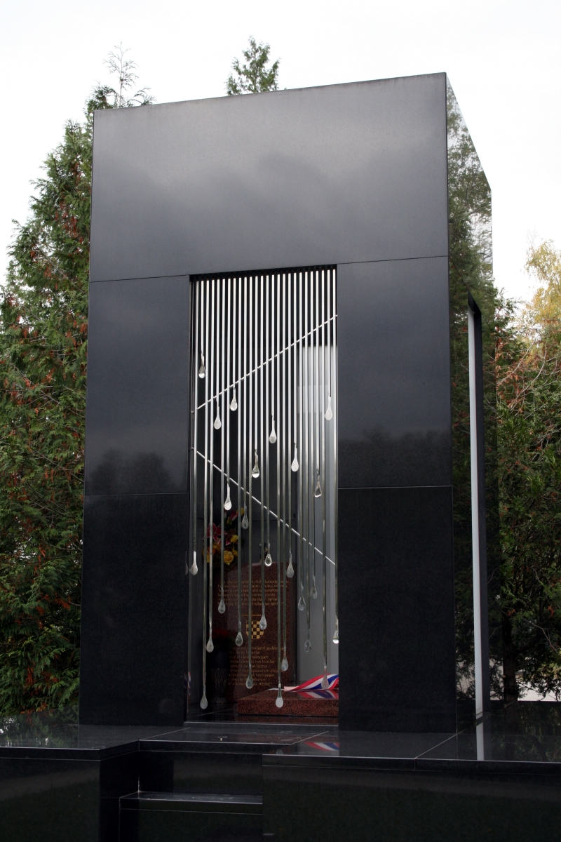 grob Bruna Bušića na Mirogoju u Zagrebu, Hrvatska